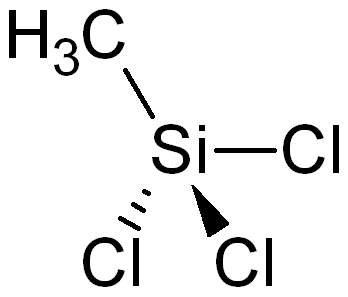 Methyltrichloorsilaan